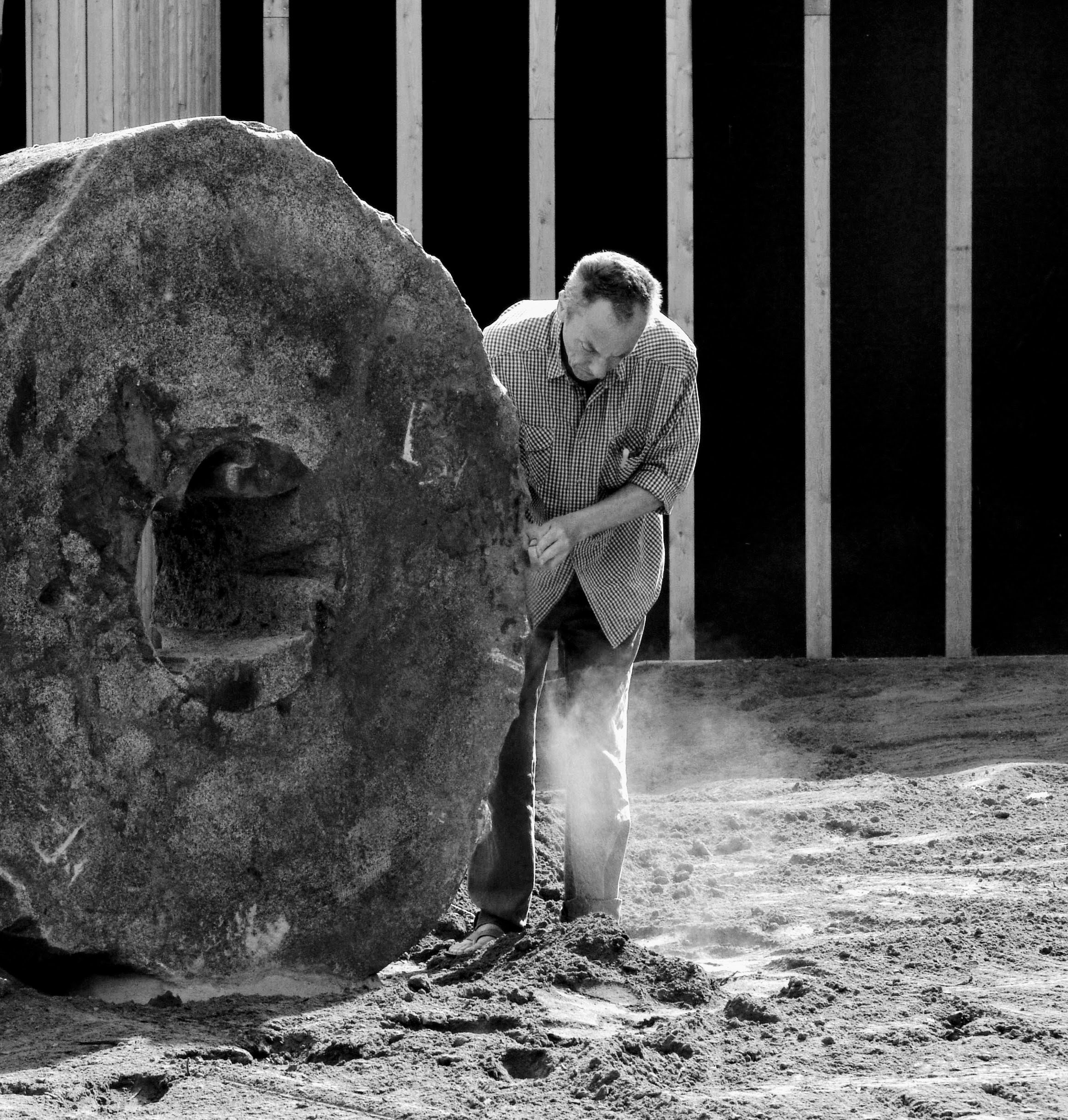 Guy Rombouts aan het werk bij een sculptuur in de openbare ruimte (Zorgcentrum De Lisdodde, Mechelen)